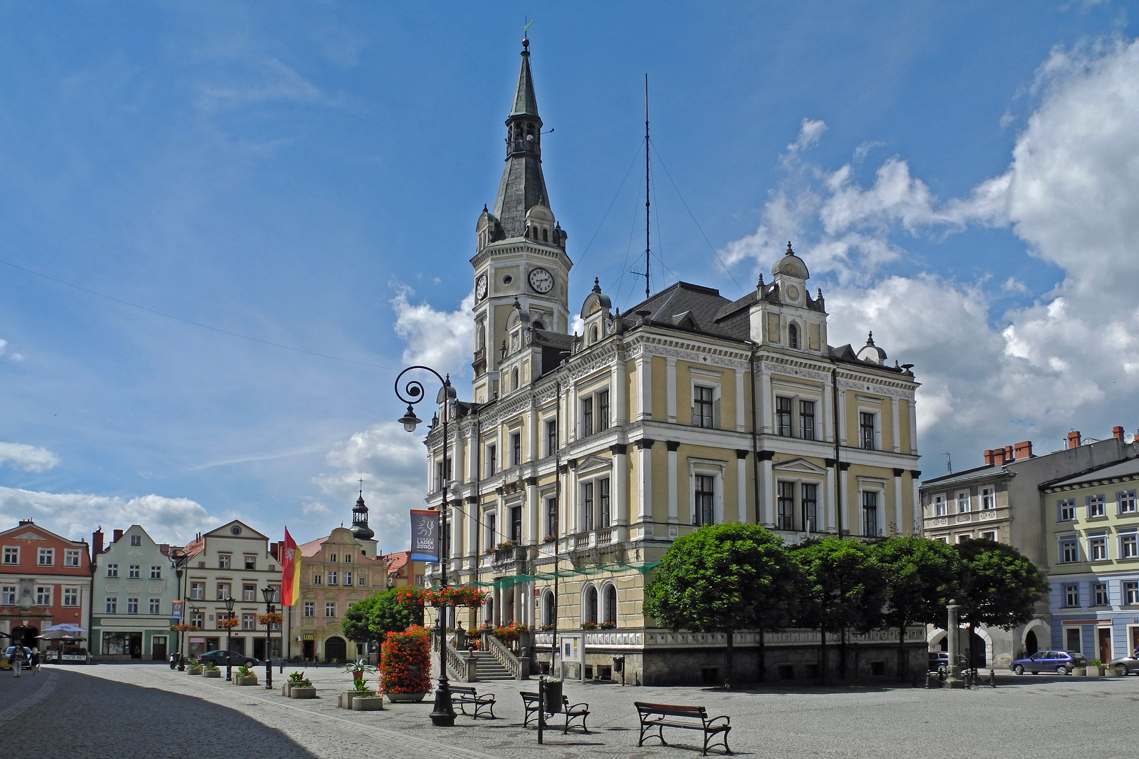 Rathaus auf dem Ringplatz in Lądek-Zdrój (Bad Landeck)